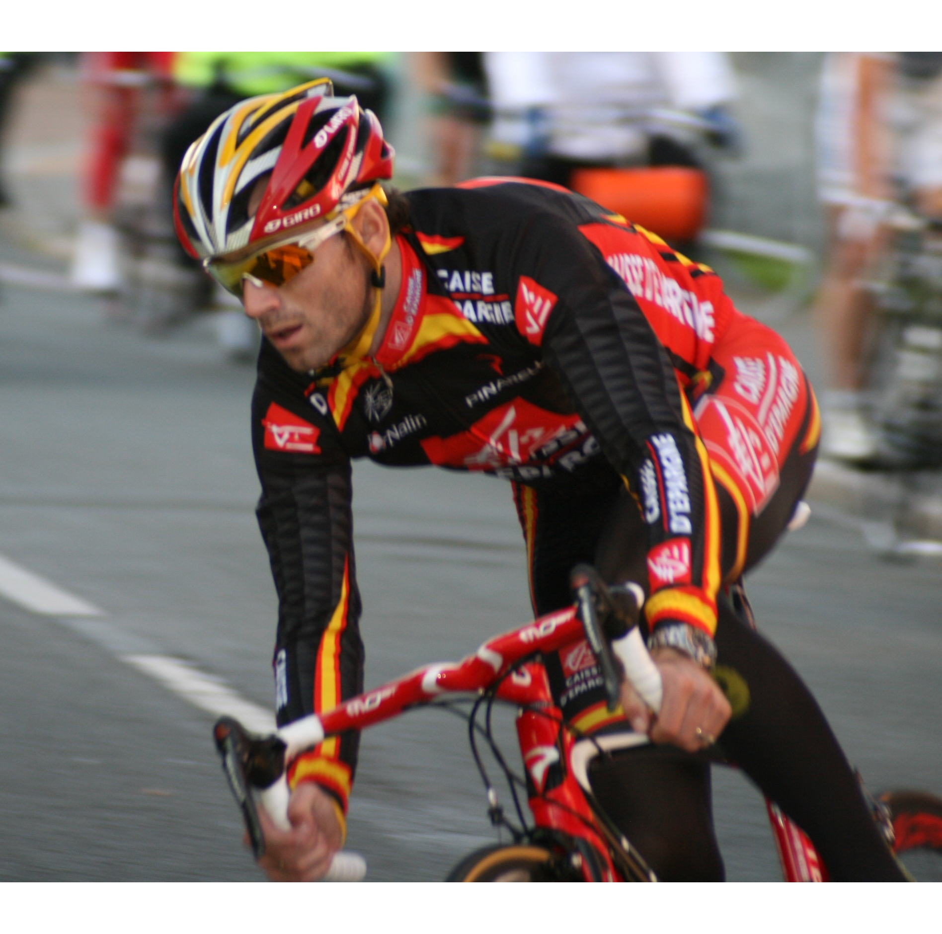 Alejandro Valverde, à la Roue des As 2008 à Marquette-lez-Lille (France)